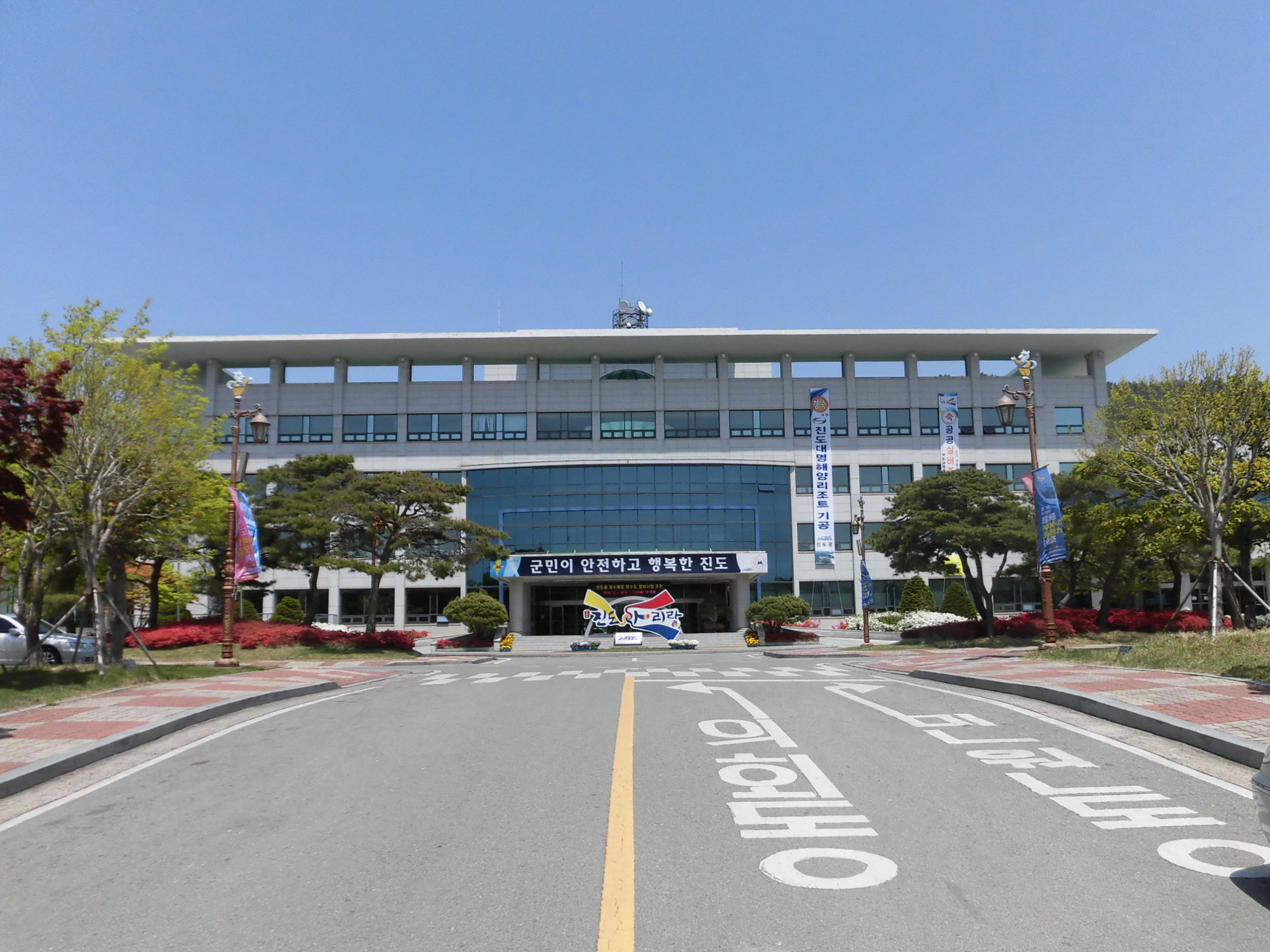 전라남도 진도군에 있는 진도군청